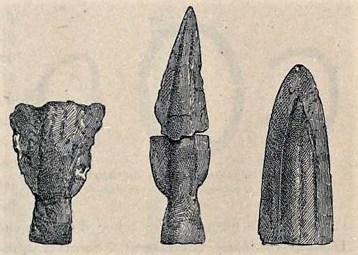 Dessins d'armes en bronze retrouvées en 1861 sur l'oppidum des Châteliers